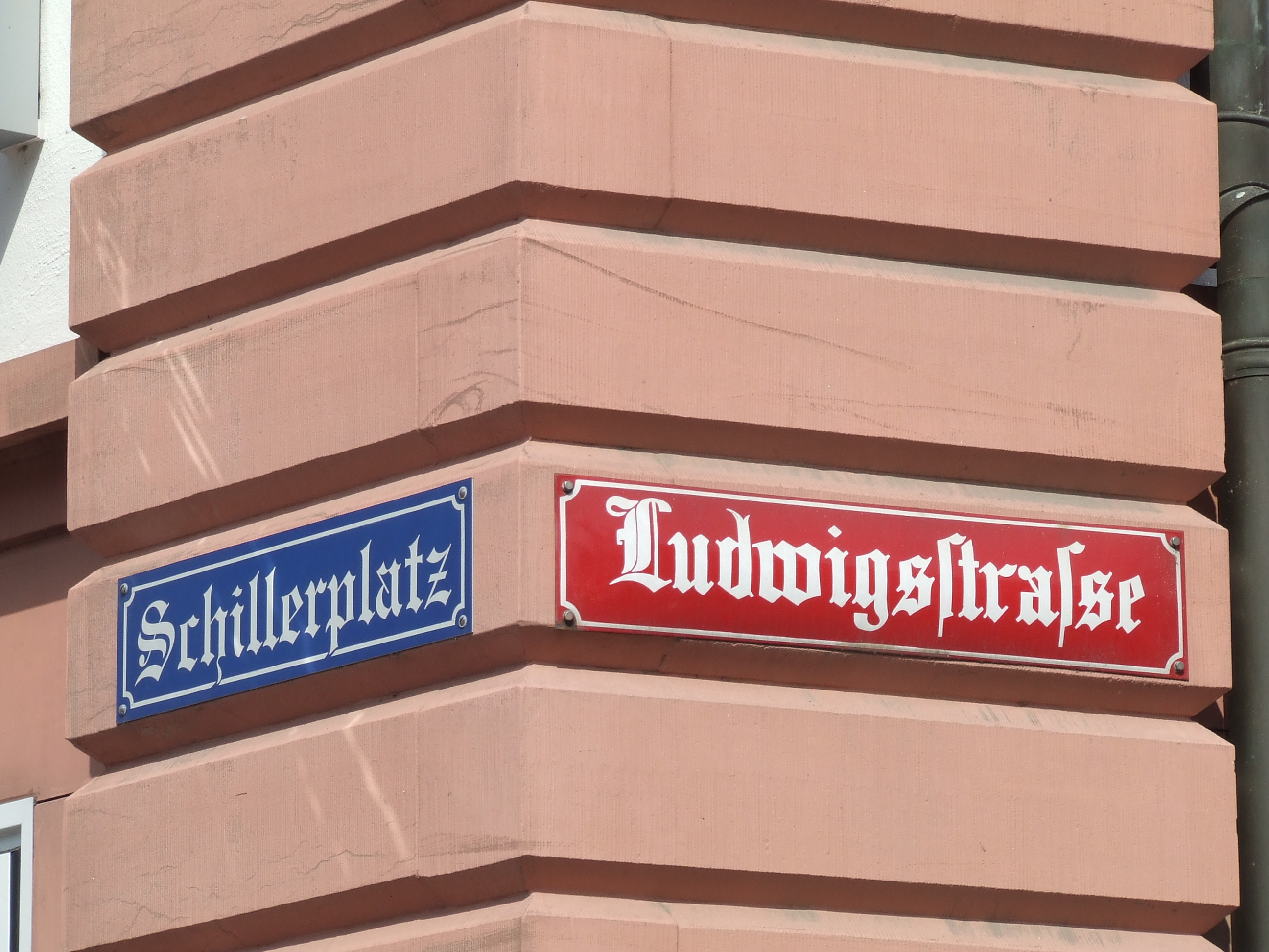 Ludwigsstraße (Mainz) in Mainz